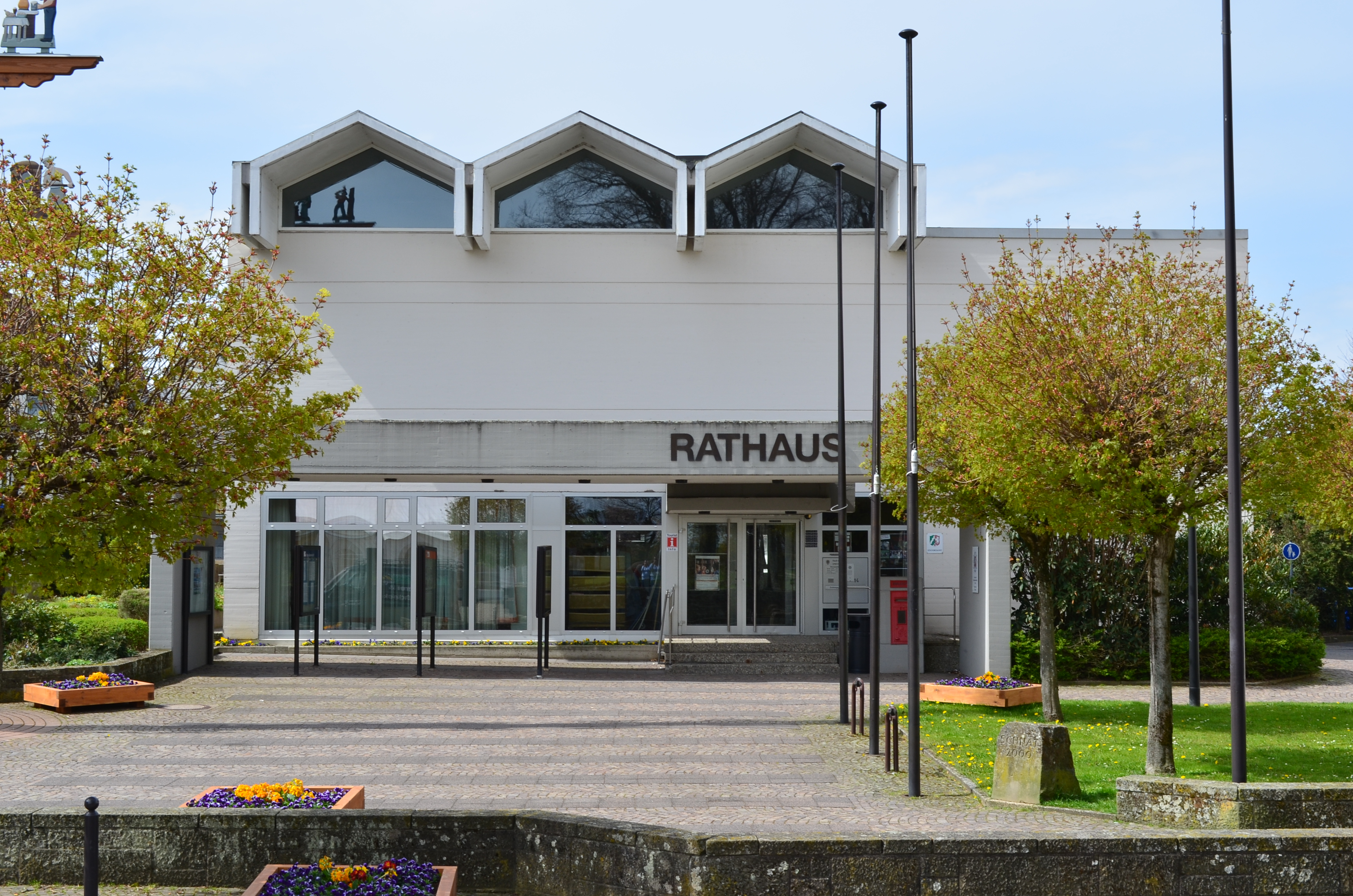 Rüthen neues Rathaus